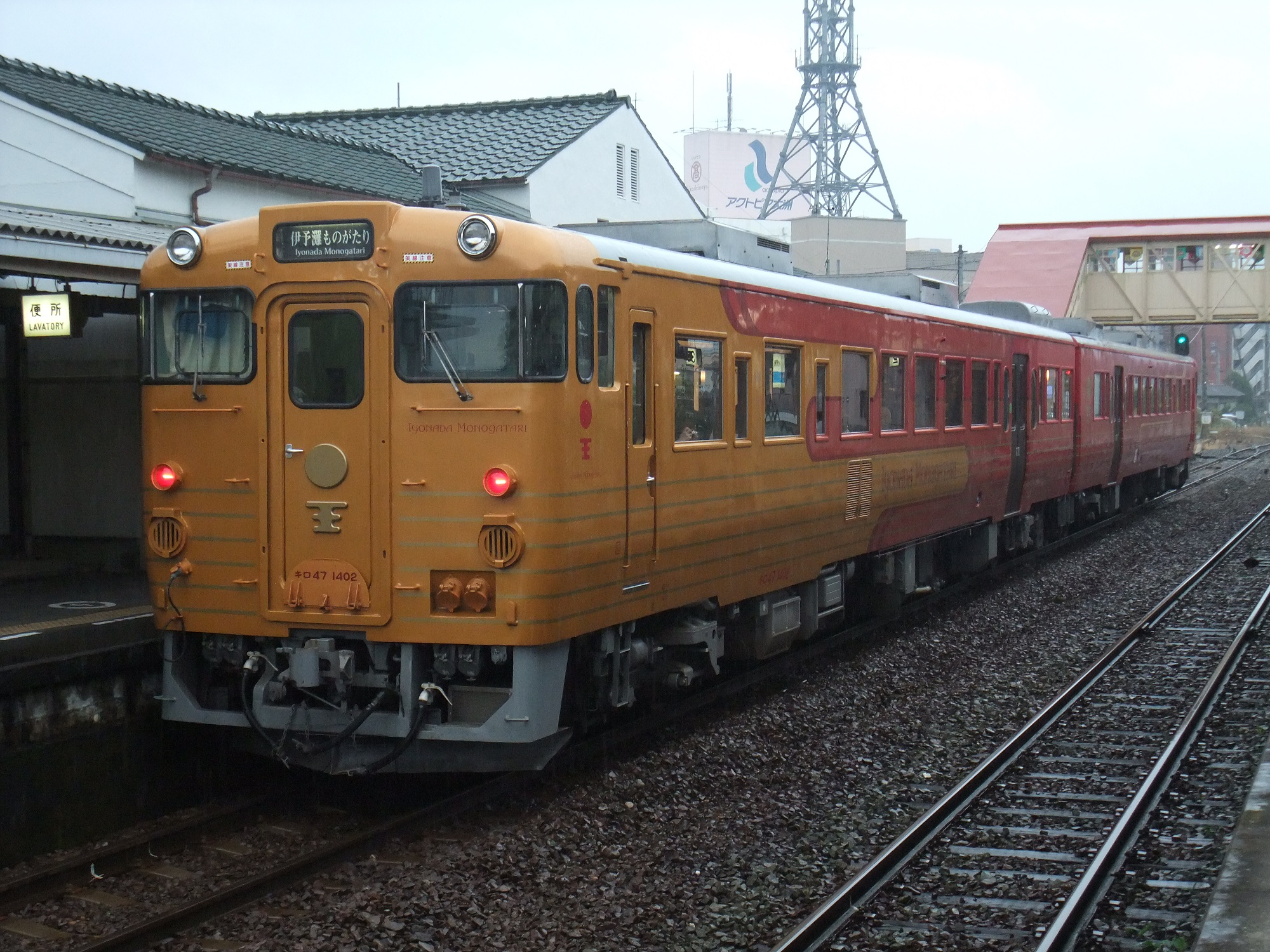 JR四国キロ47-1402